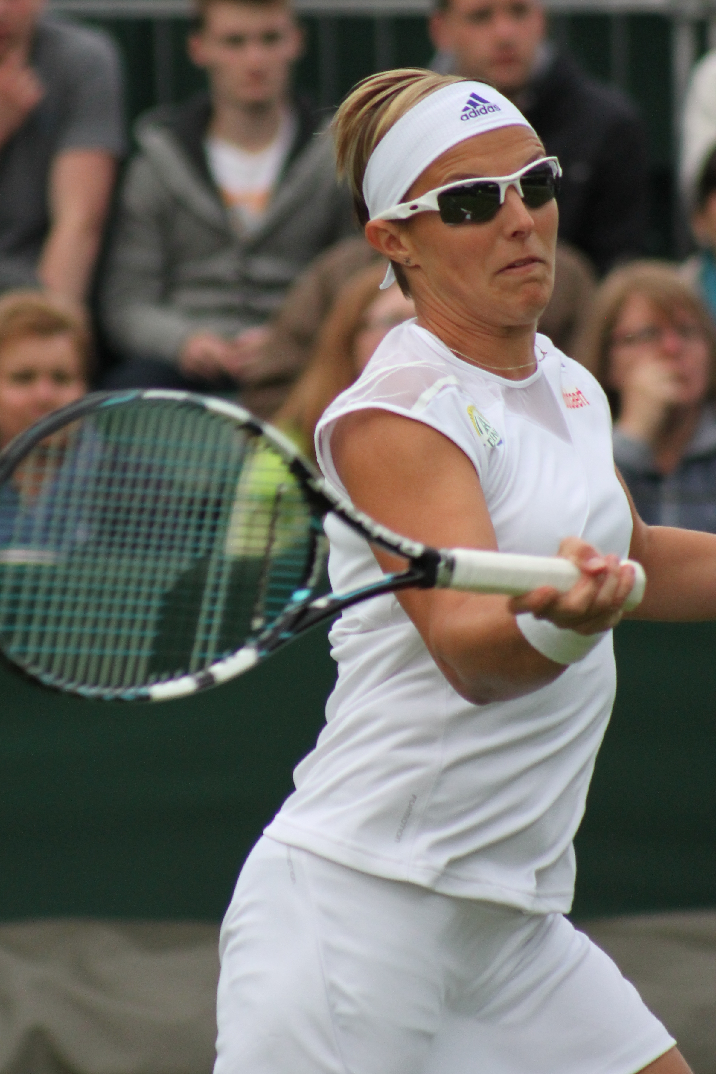 Flipkens WM13-014